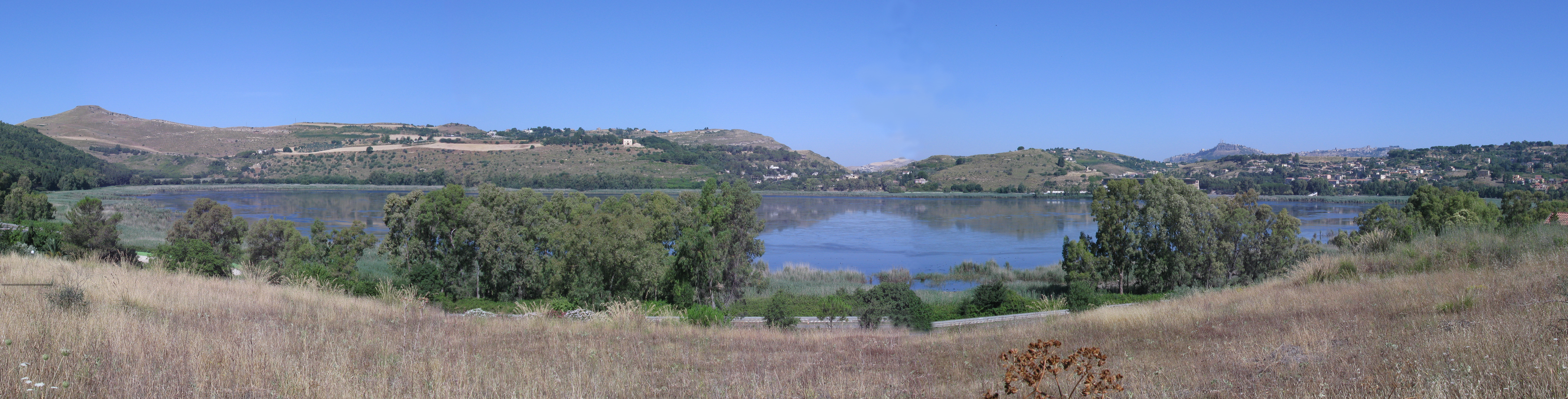 Veduta panoramica del lago di Pergusa.